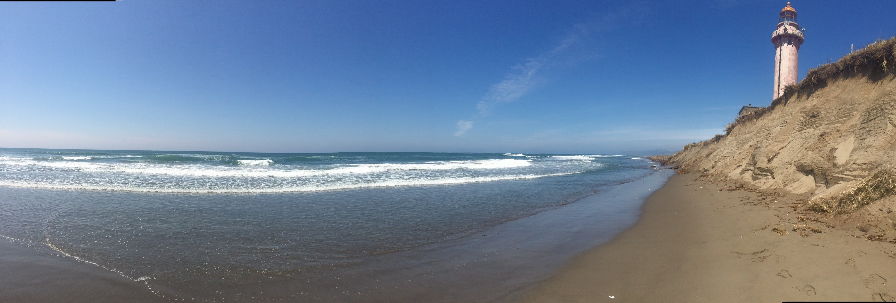 Мыс Слепиковского, Холмский городской округ This image is related to the protected area of Russia number 6510075